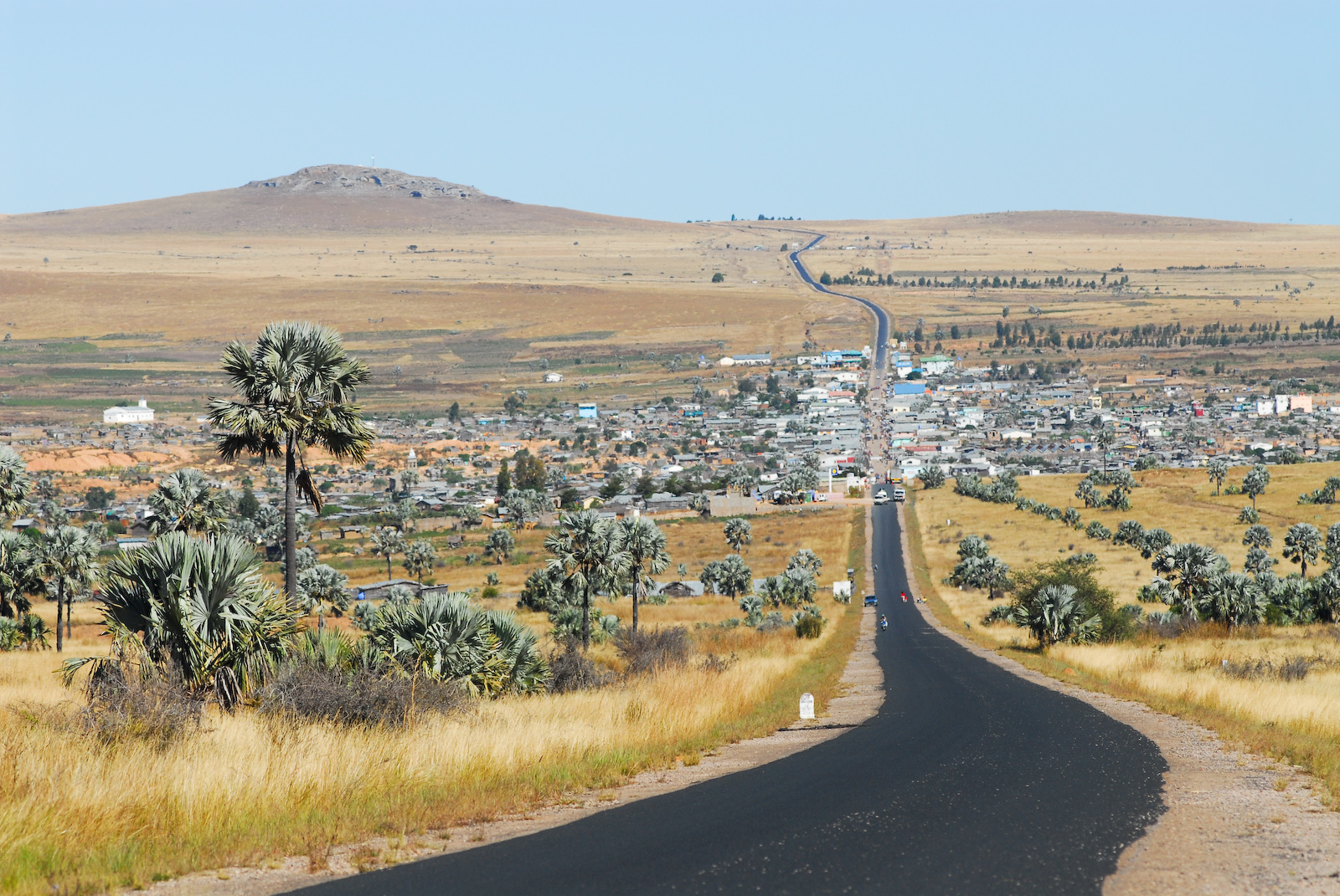 Ilakaka, ville "champignon" du saphir